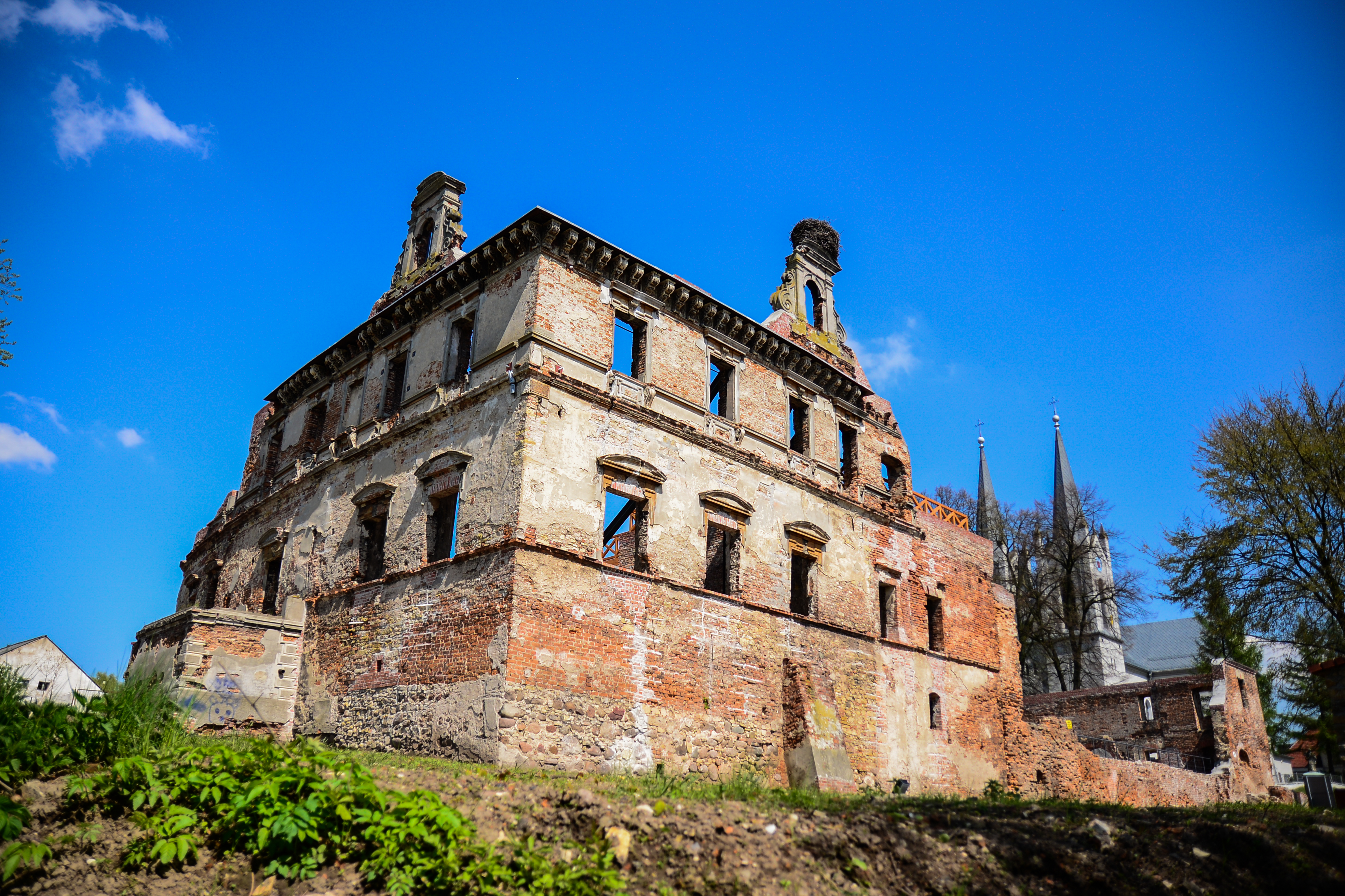 Ujazd, Zamek biskupów wrocławskich w Ujeździe Wikidata has entry Q9386571 with data related to this item.